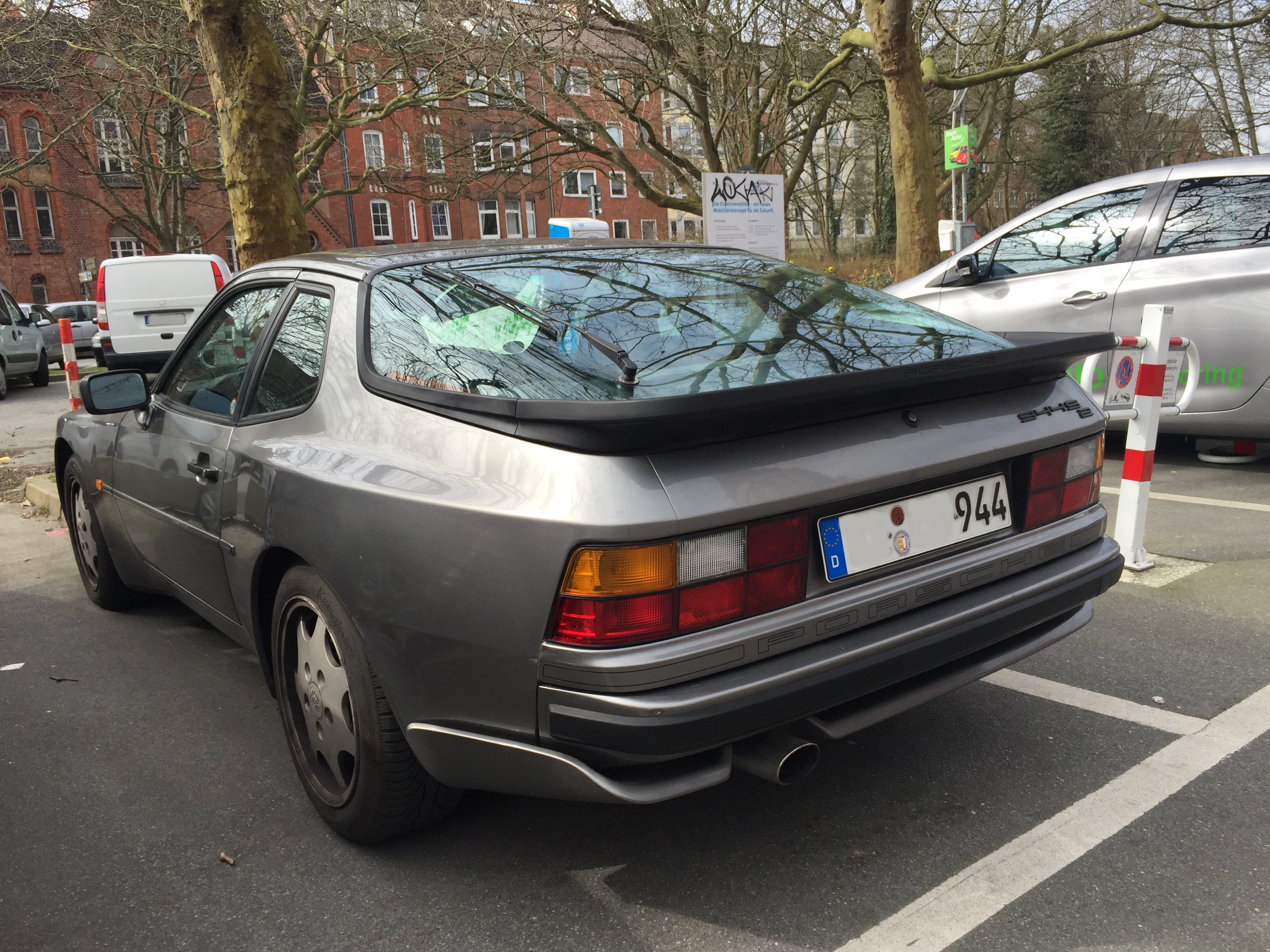 Porsche 944 S2 Heckansicht